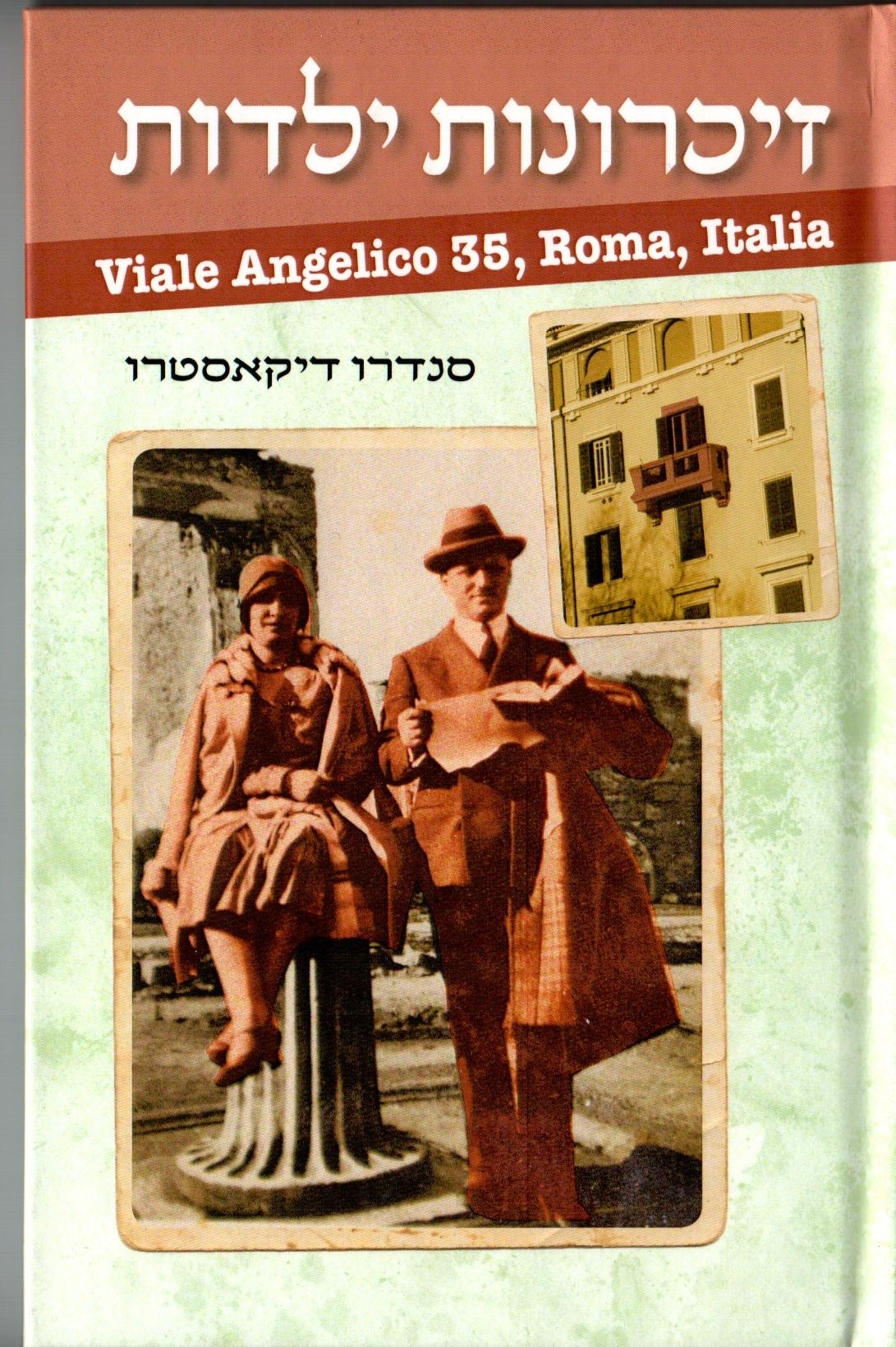 עטיפת הספר זיכרונות ילדות - סנדרו דיקאסטרו